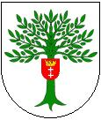 Herb Oliwy (Gdańsk).